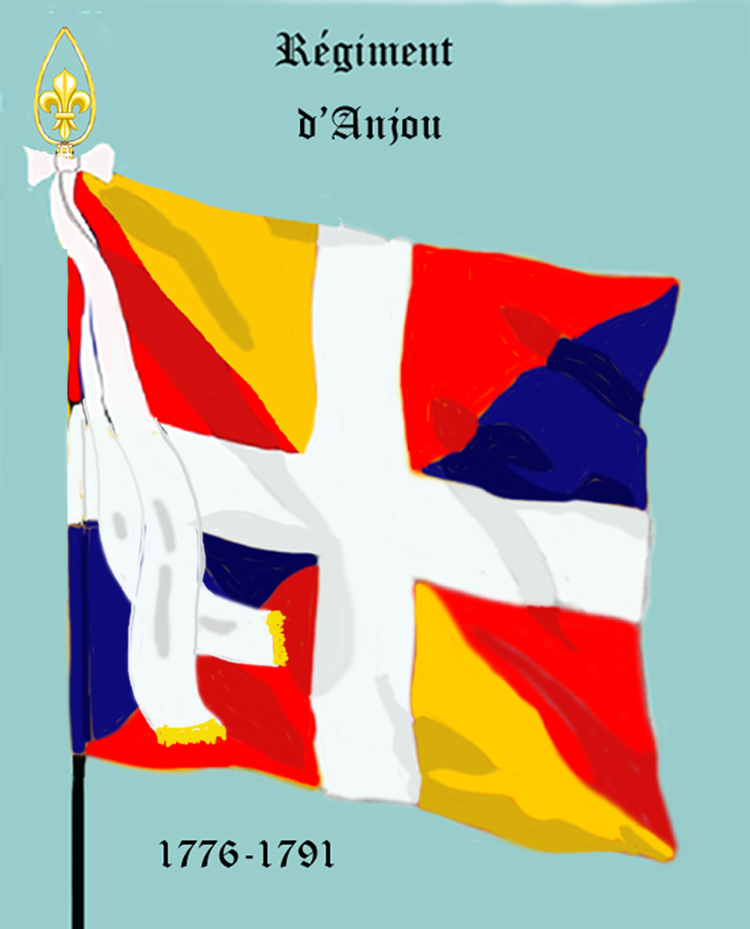 Ordonnanzfahne eines königlich französischen Infanterie-Regiments. - Entnommen und überarbeitet aus: „LES UNIFORMES ET LES DRAPEAUX DE L'ARMÉE DU ROI“ Marseille 1899. (Drapeau d'Ordonnance d' un régiment française d'infanterie royale.)